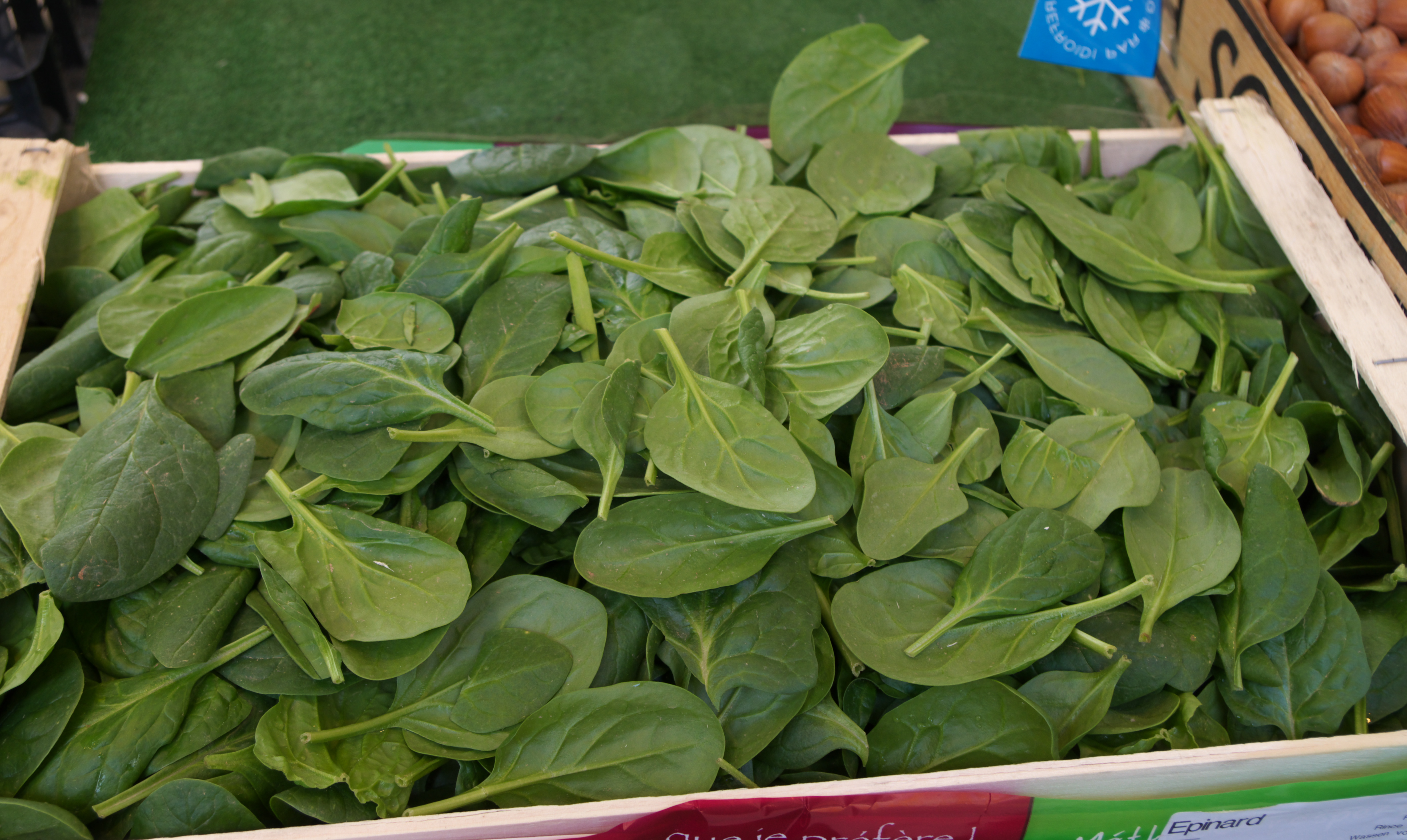 Jeunes pousses d'épinards